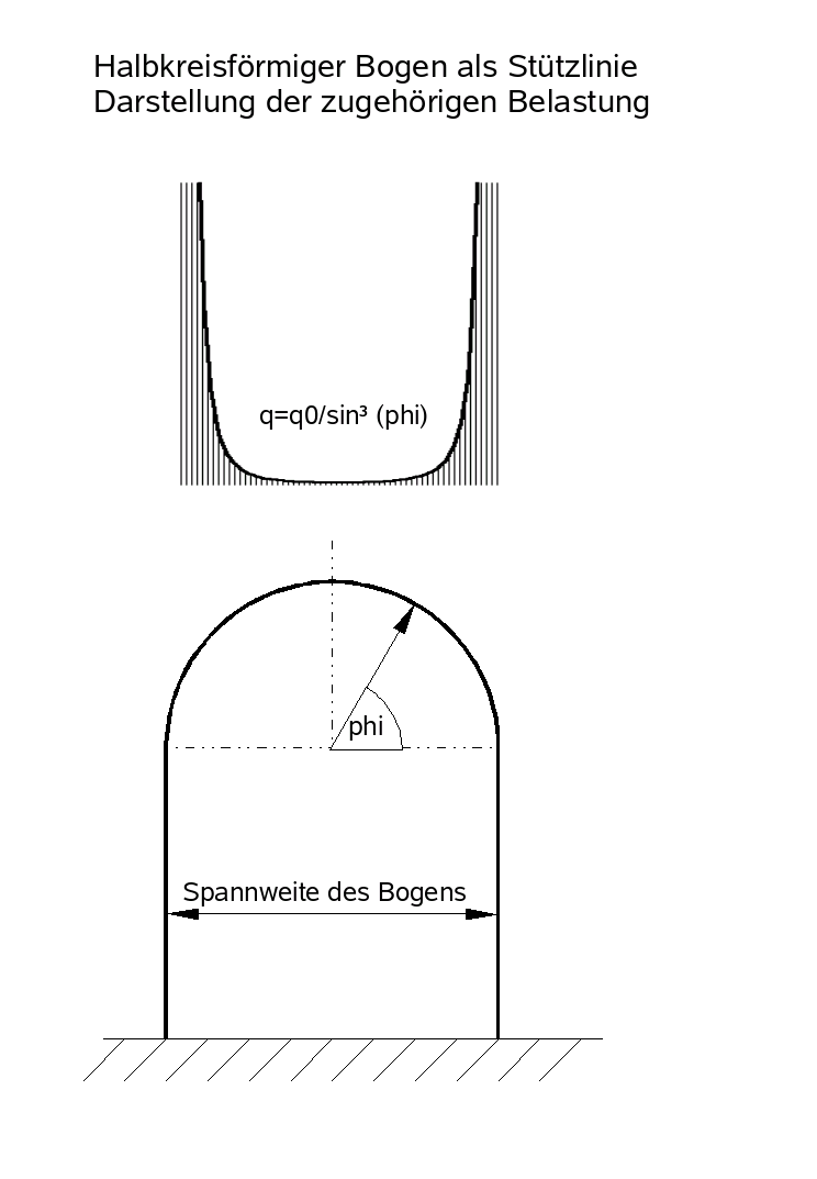 Kreisförmiger Bogen als Stützlinie sowie die zugehörige Belastung